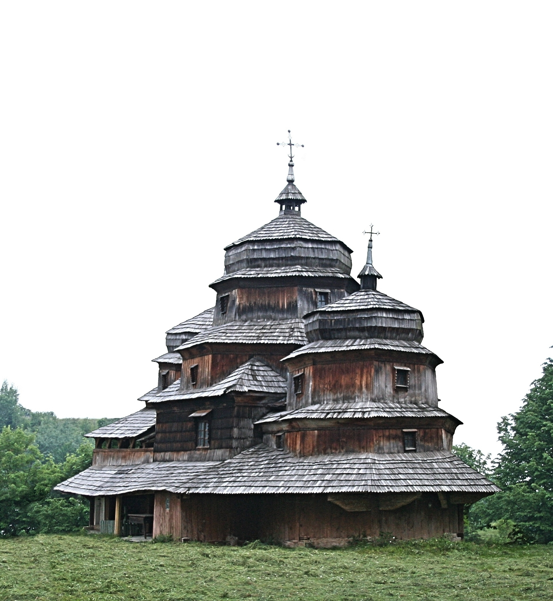 Михайлiвська ц-ва